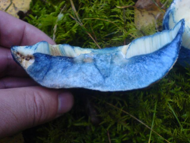 piaskowiec modrzak - przekrój po 10 secundach